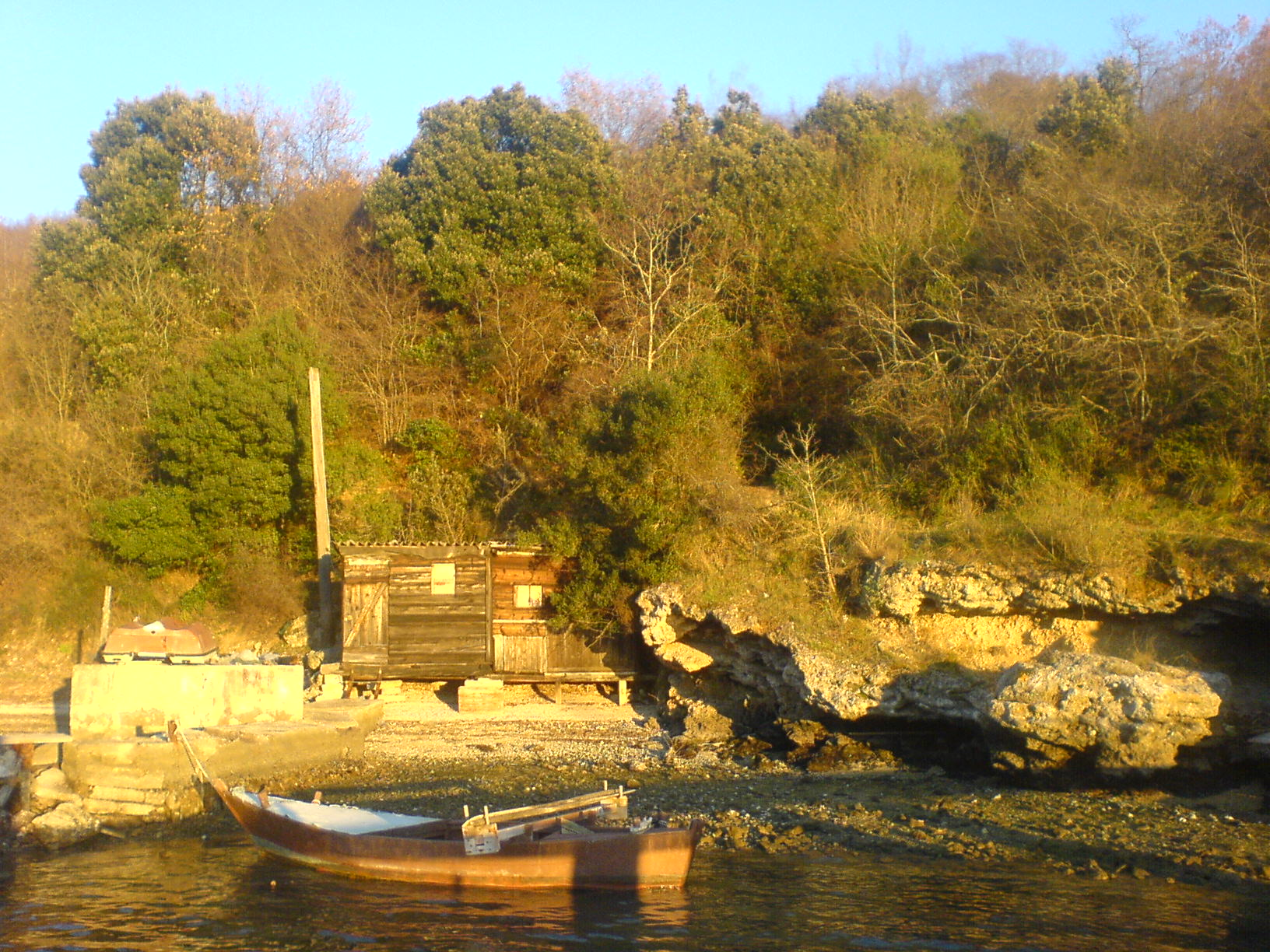 trget